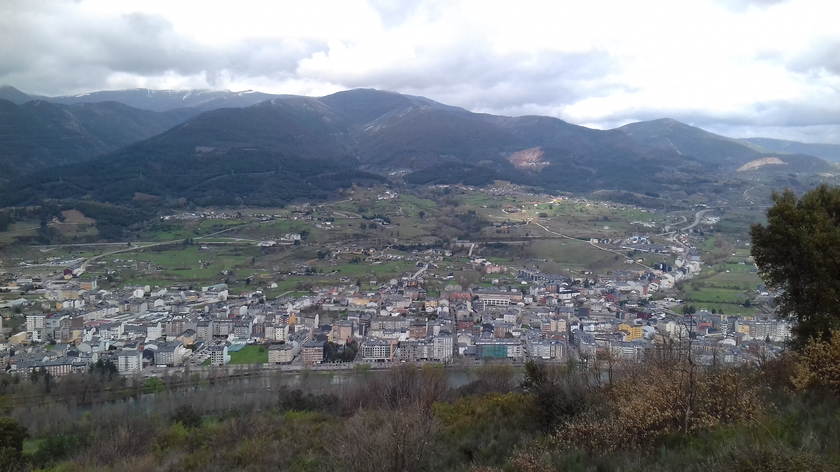 Vista xeral do Barco de Valdeorras